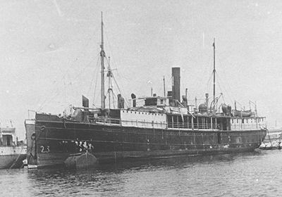 אוניית המעפילים מולדת